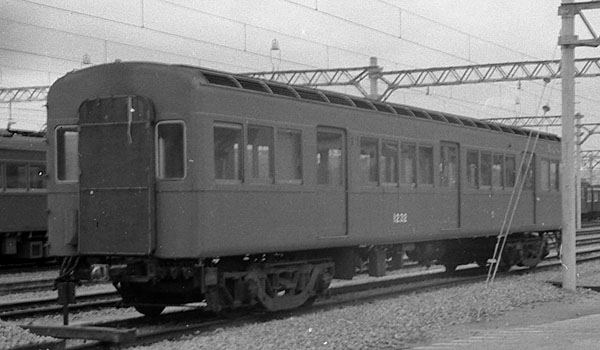 阪急1232 1981年頃 西宮車庫